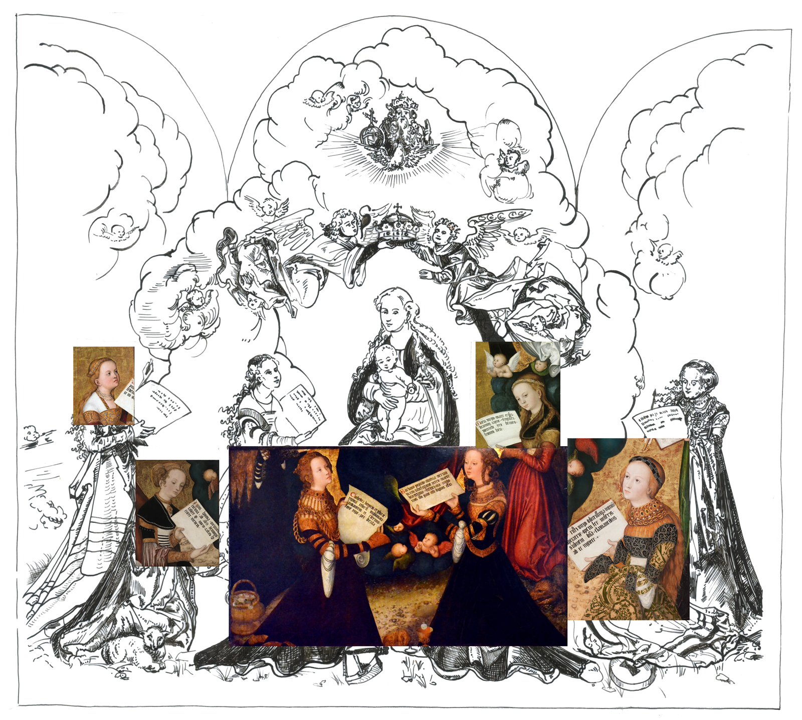 Prague Altar, drawing by Dagmar Hamsíková, reconstruction by Jindřich Nosek